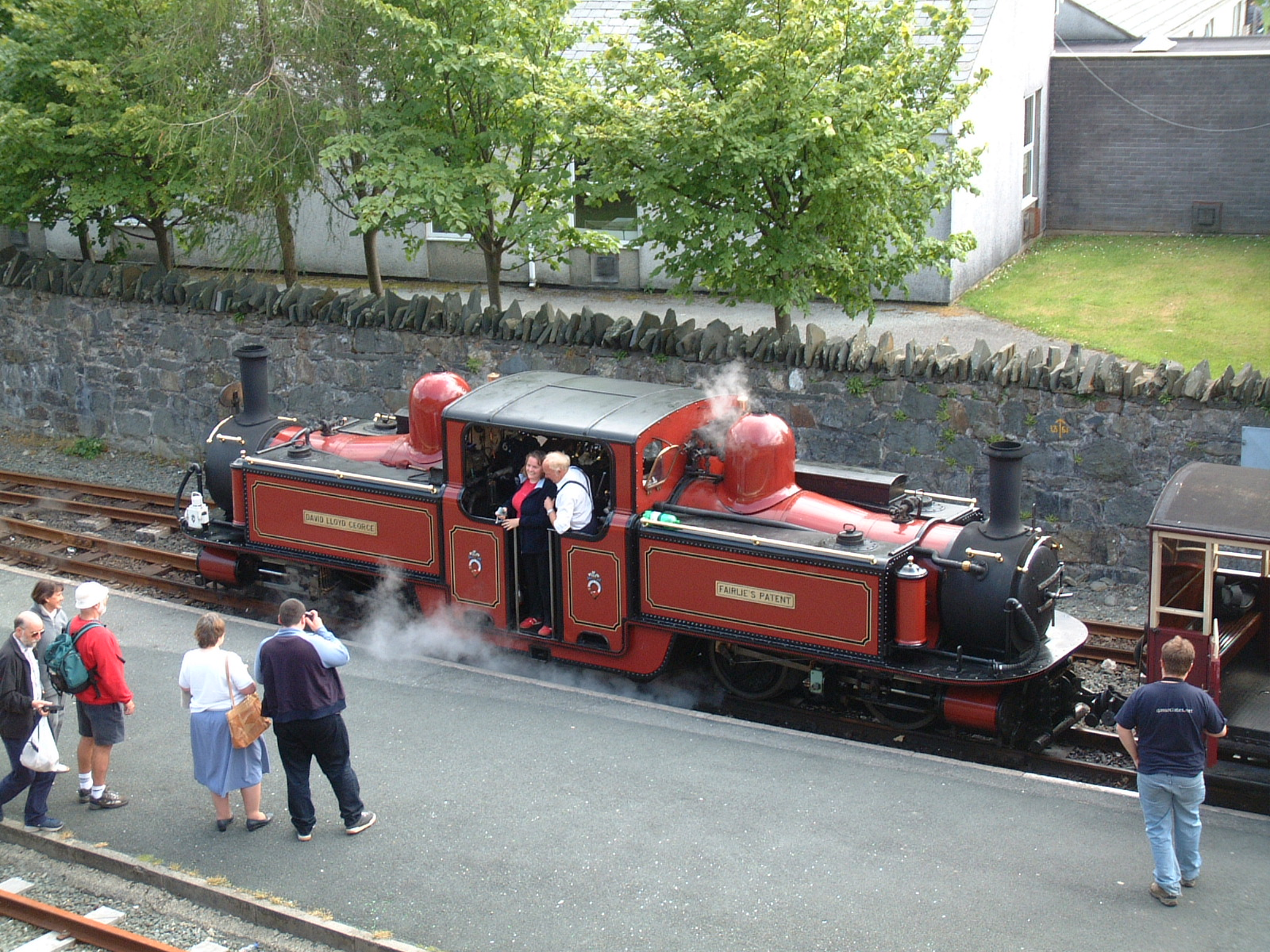 Ffestiniog Railway engine David Lloyd George at Blaenau Ffestiniog.